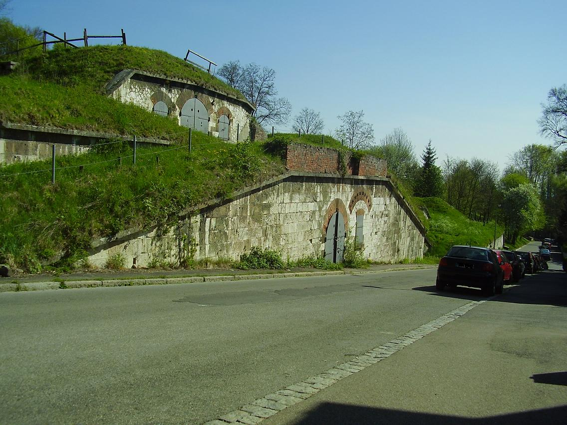 Bunkeranlagen der Bundesfestung Ulm (Prittwitzstraße)